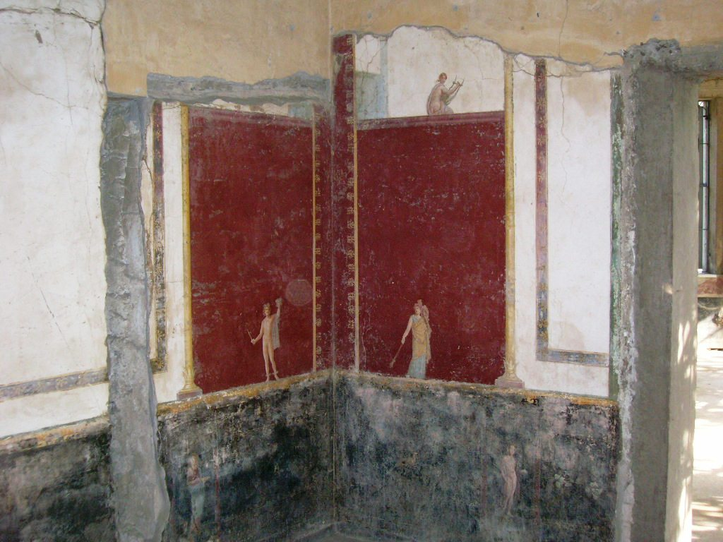 Villa San Marco, villa d'otium di Stabiae, a Castellammare di Stabia